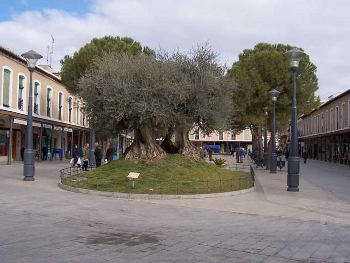 Placo kaj miljaraĝa olivarbo.